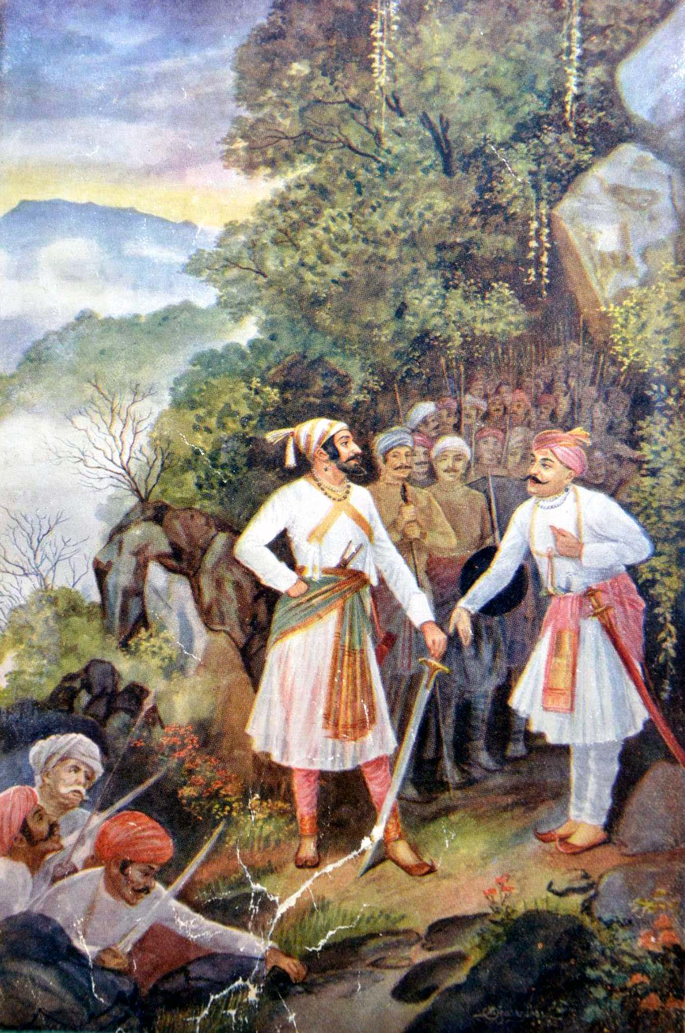 By M.V.Dhurandar (Courtesy:Shri Bhavaini Museum and Lbrary) Shivaji Maharaja and Bhaji prabhu at Pawan Khand